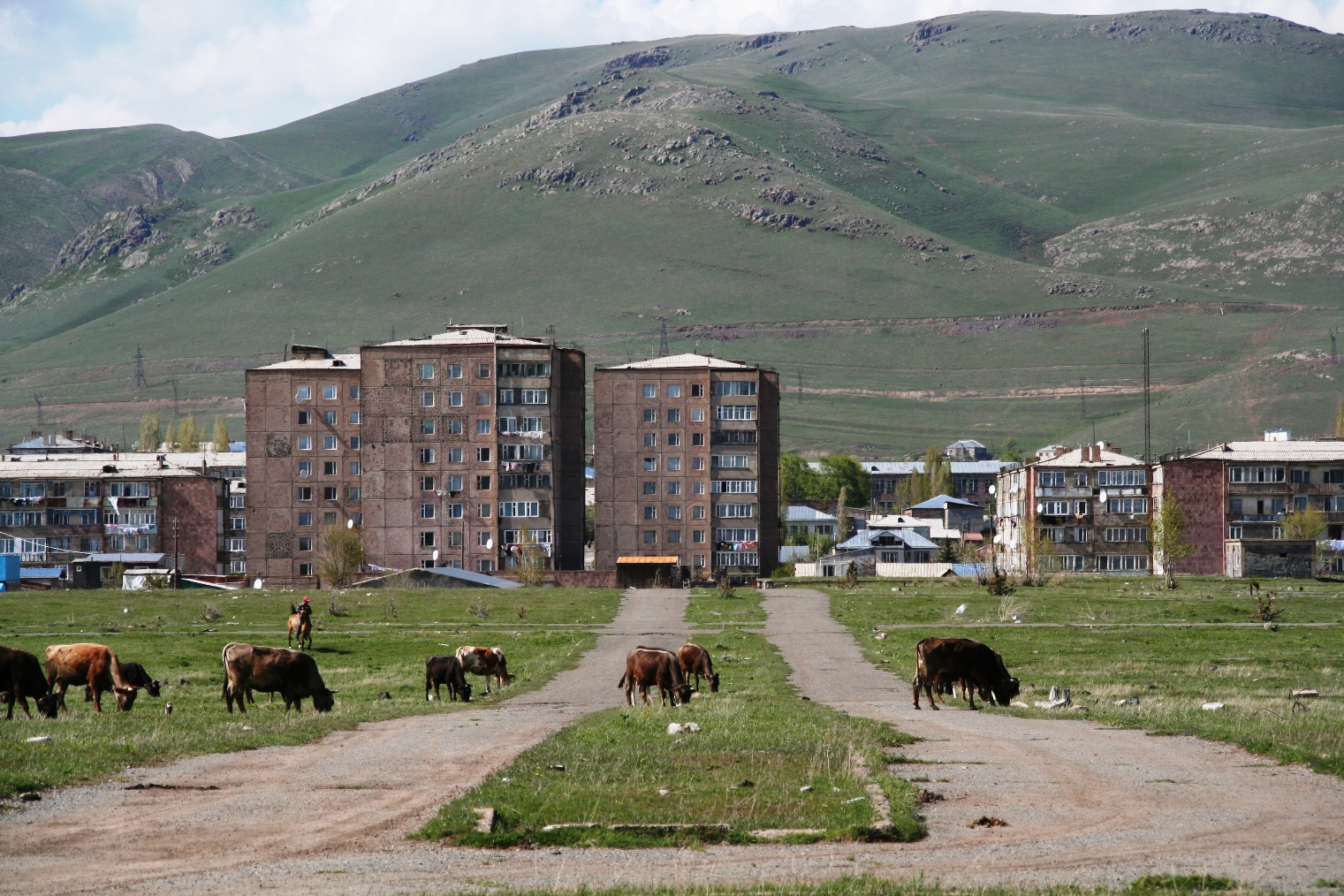 Prés à vache, parc d'attraction, Sevan, Arménie